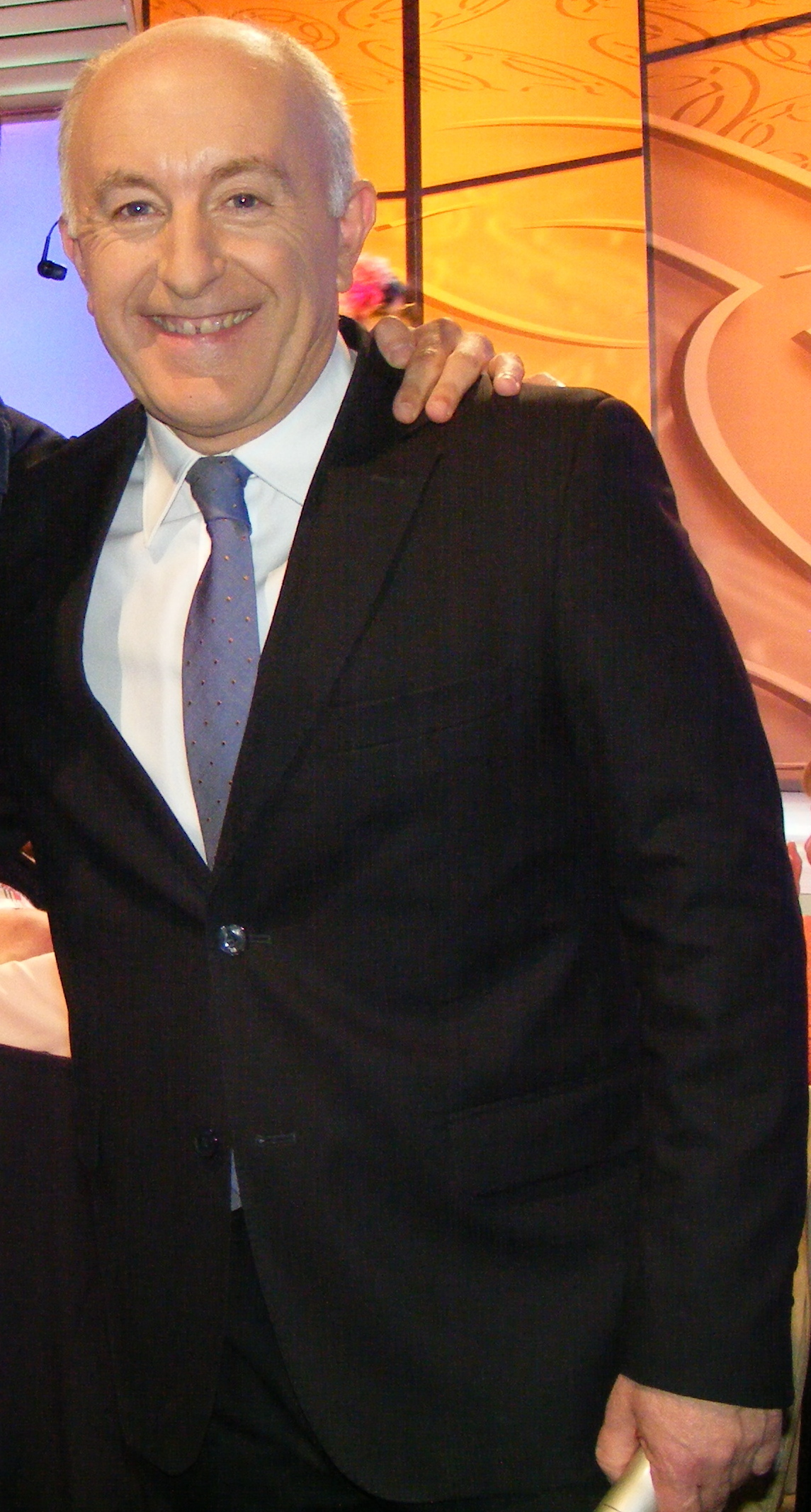 Xosé Ramón Gayoso presentador español no programa 906 de Luar